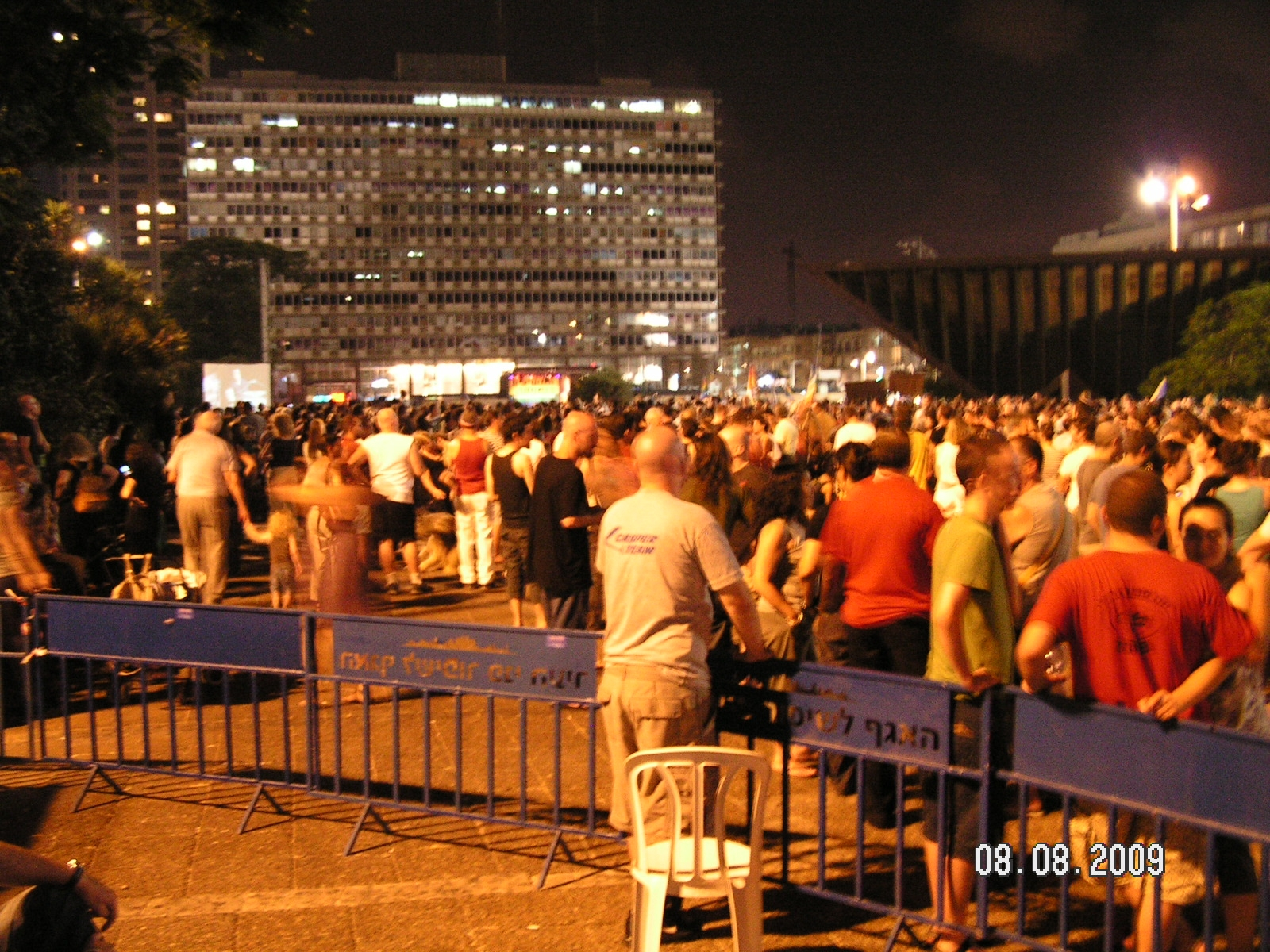 עצרת המחאה כנגד אירוע הירי על חברי הקהילה ההומו-לסבית בישראל